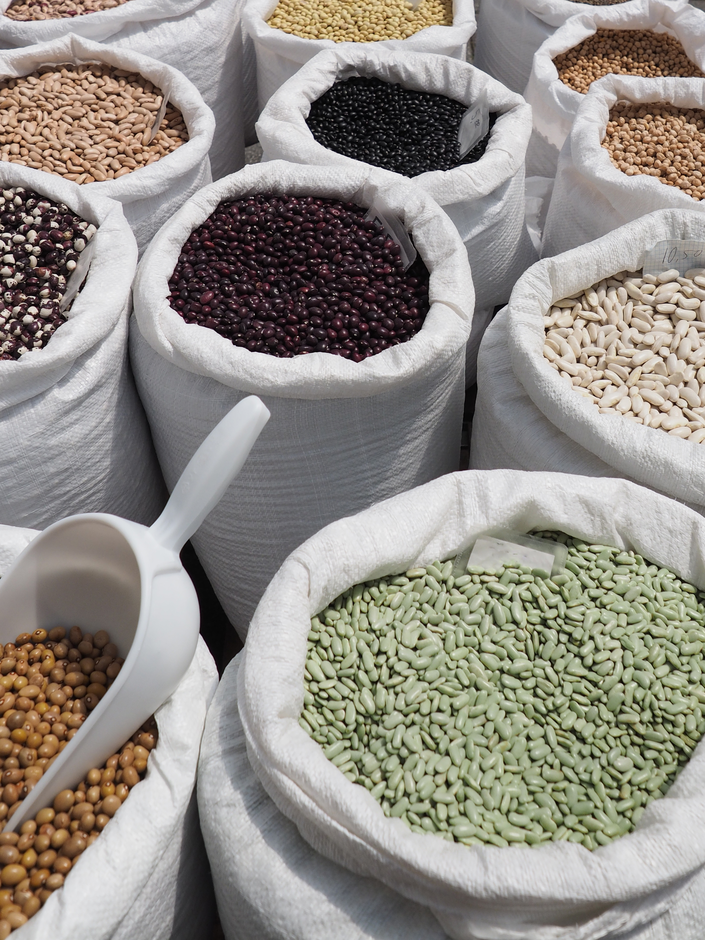 fabas